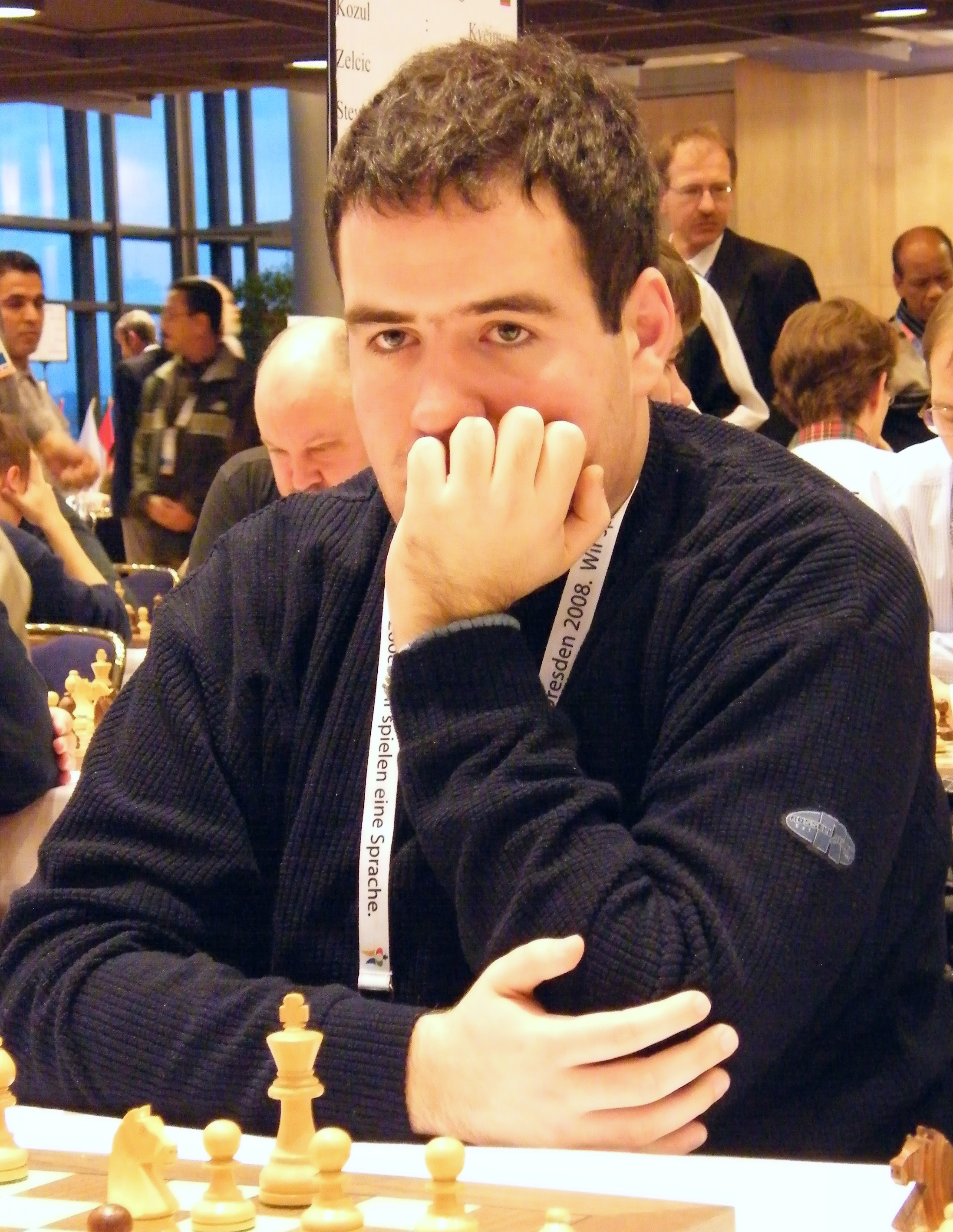 Milos Perunovic bei der 38. Schacholympiade in Dresden 2008